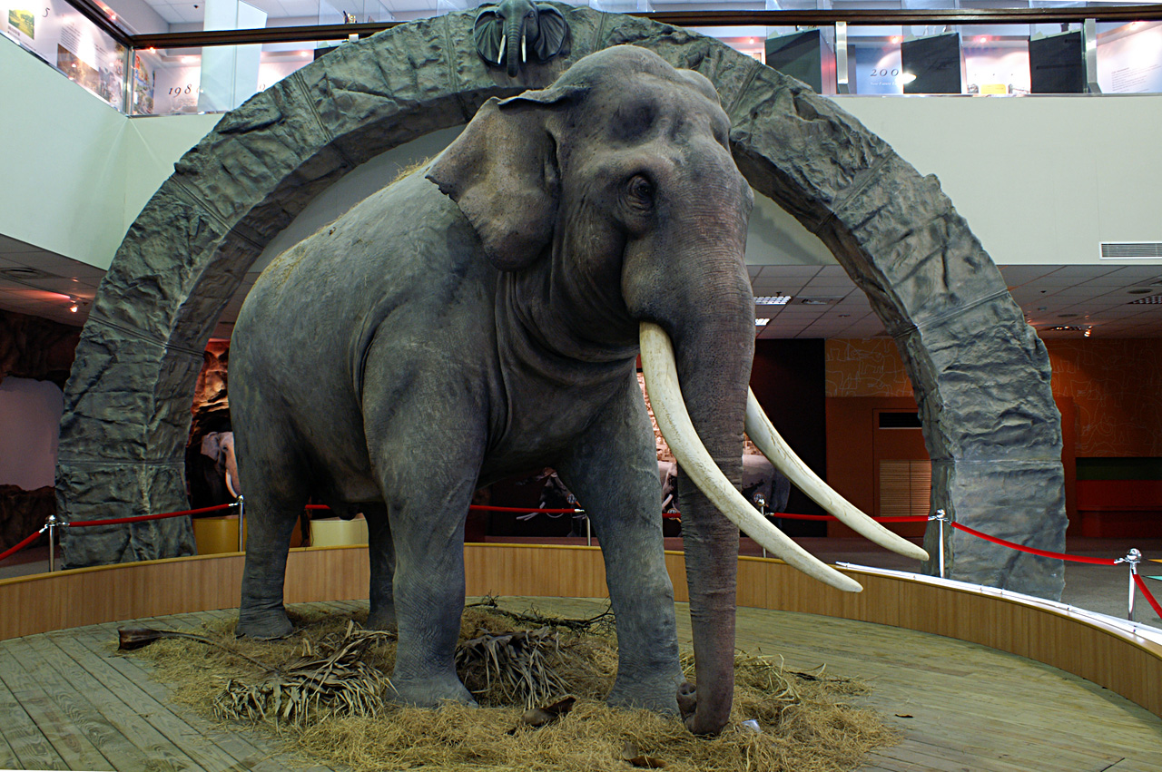 中文（台灣）: 亞洲象林旺之標本，陳列於台北市立動物園教育中心。